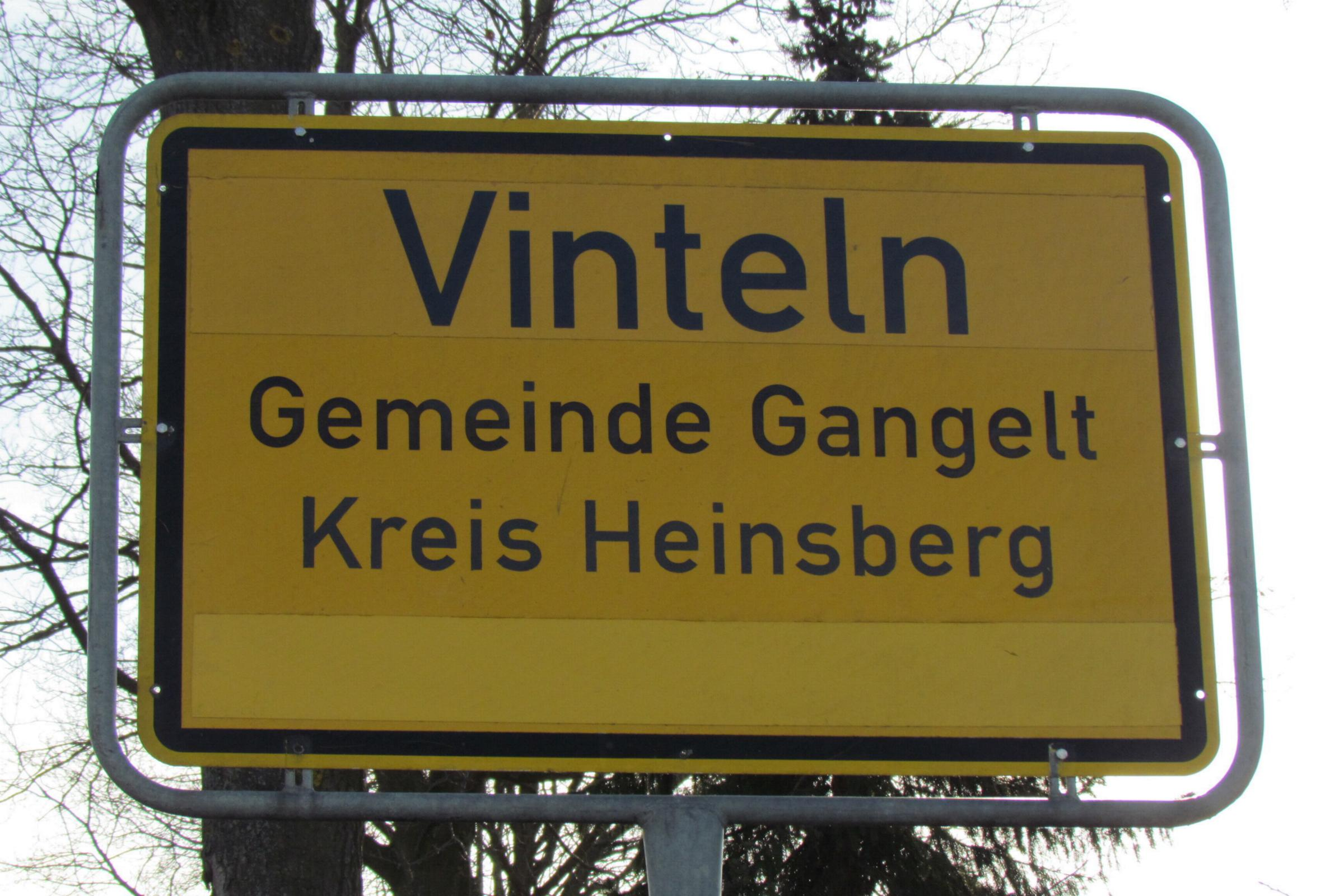 Ortsschild Vinteln